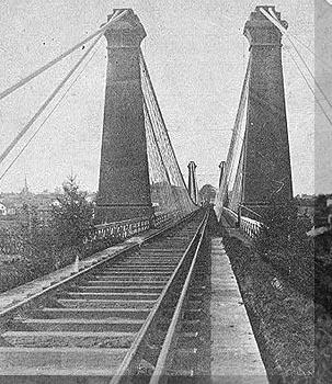 Voir le site